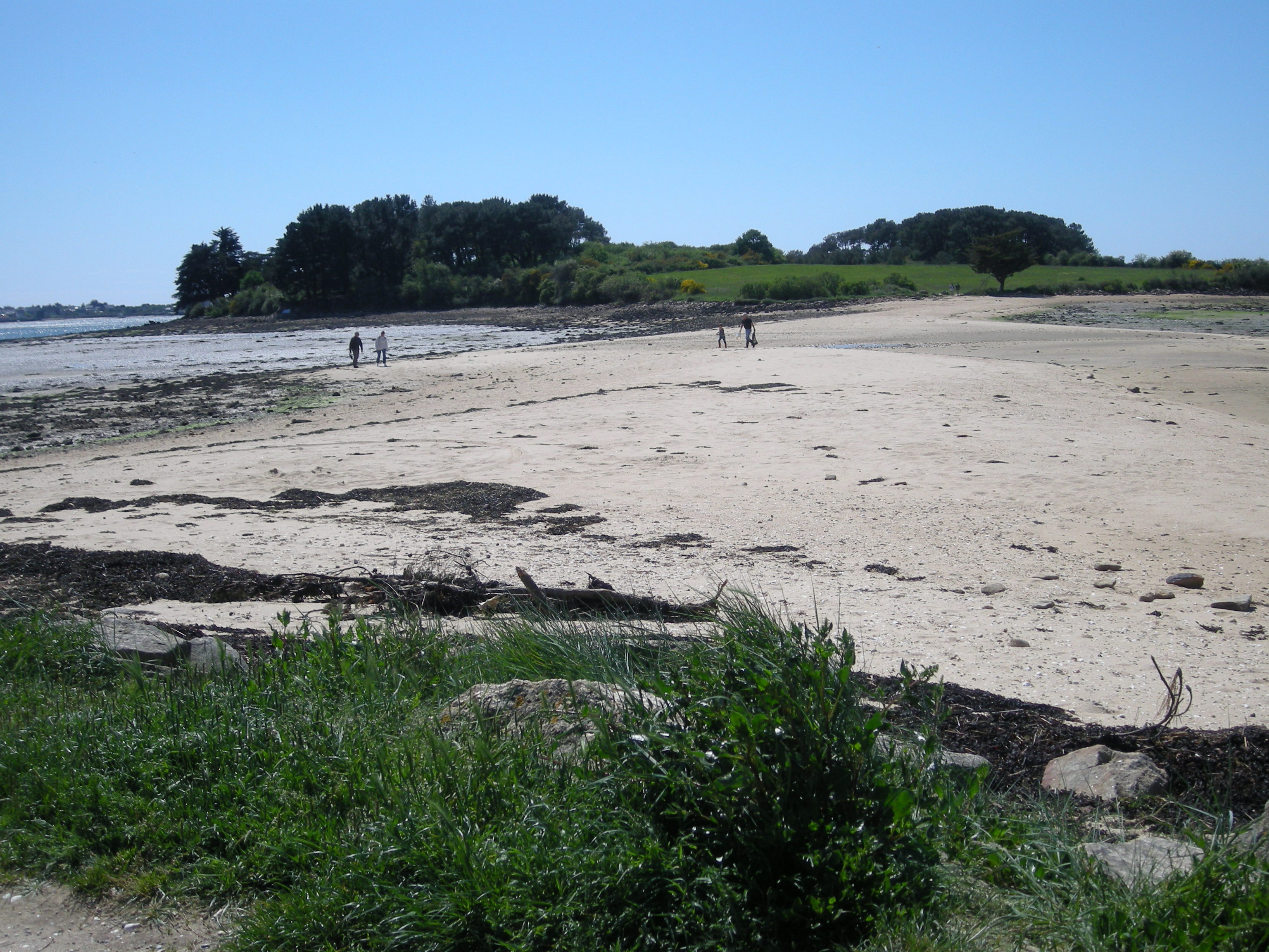 Sept Îles et son tombolo vus depuis la pointe de Séniz